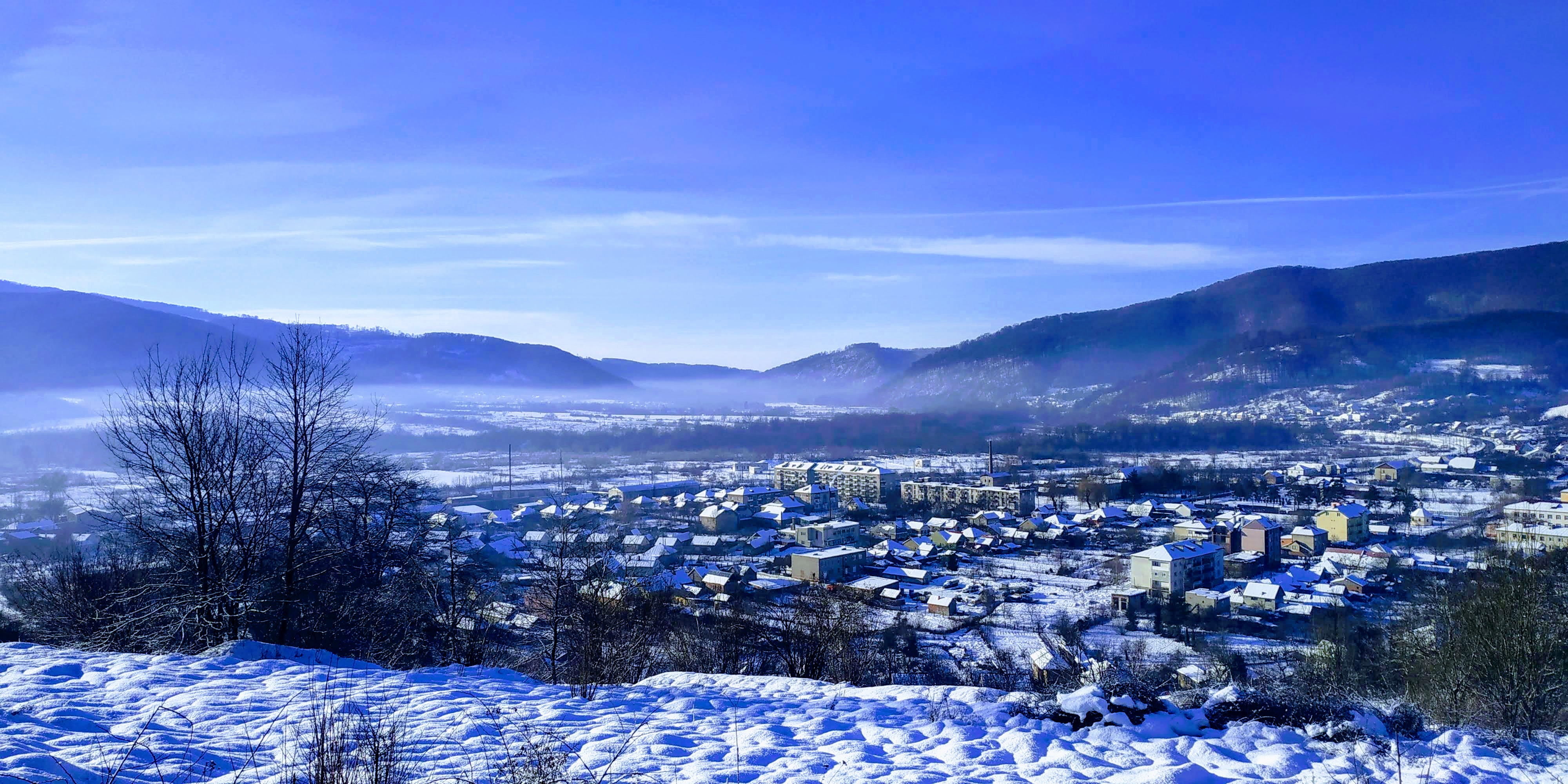 Перечин у січні 2019 року